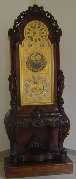 Ostravský orloj (výřez).